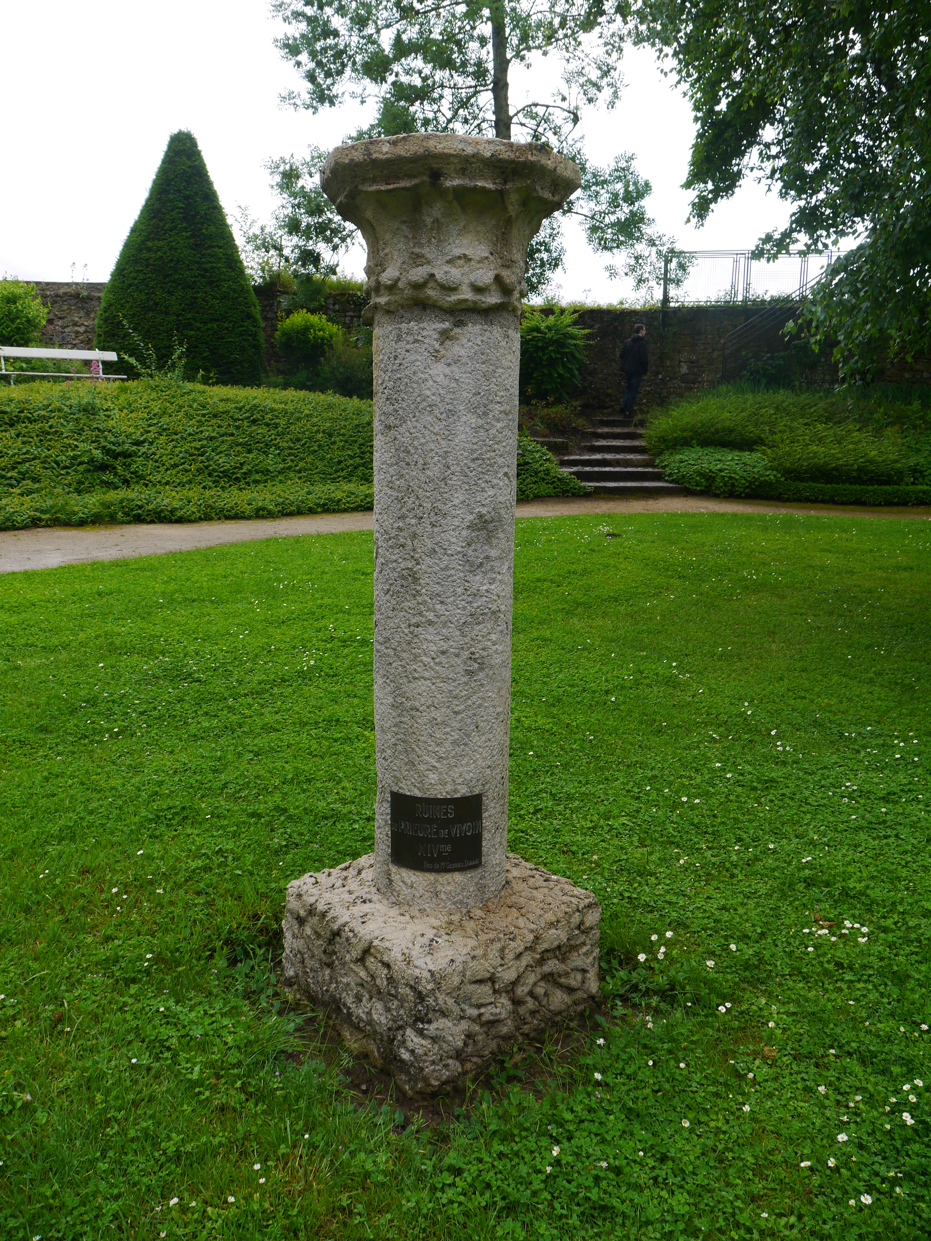 Vestige du prieuré de Vivoin visible dans le square du château.